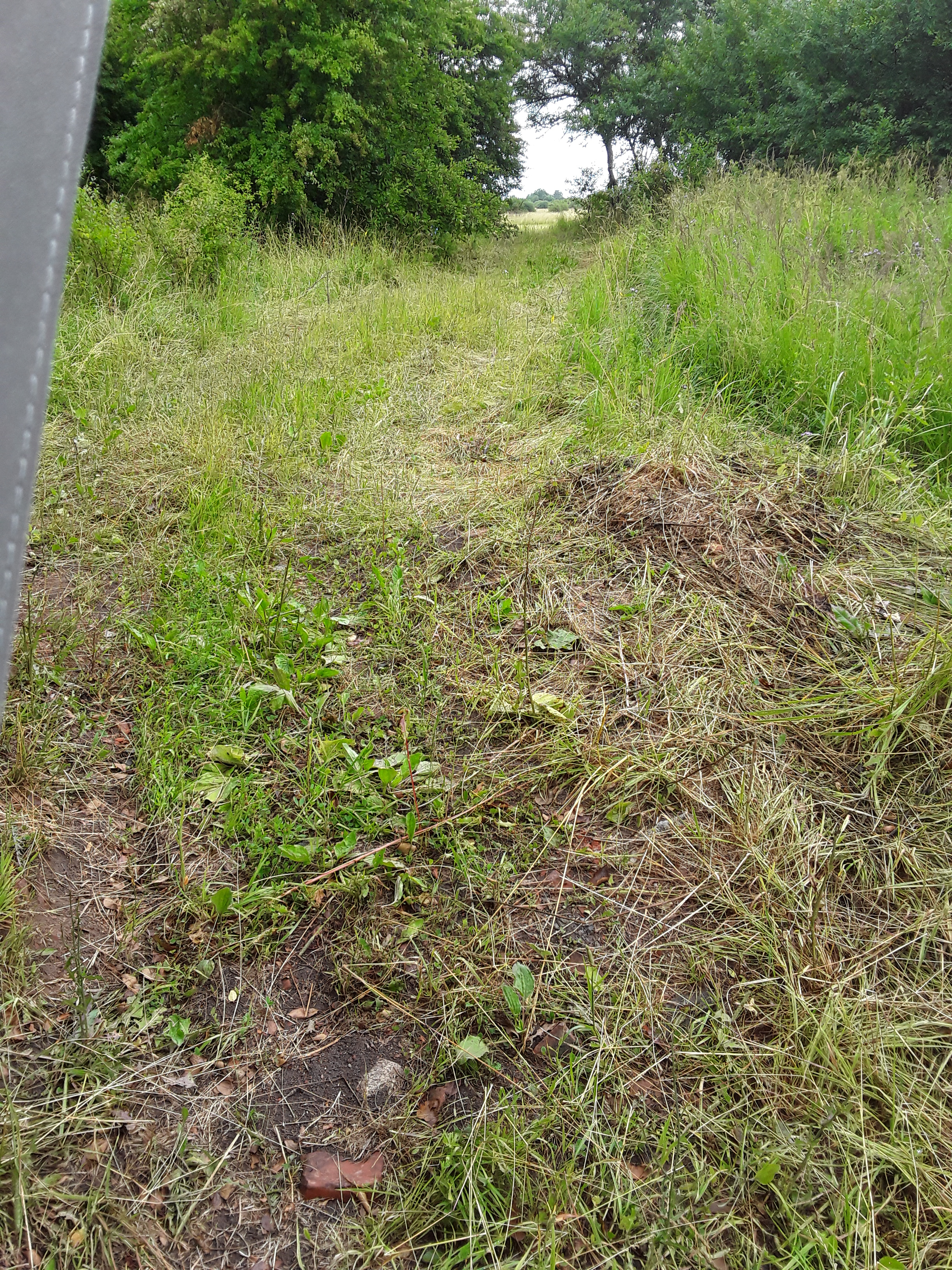 Wüstung Petrineusaß, einstige Nebenstraße mit Gebäuderesten